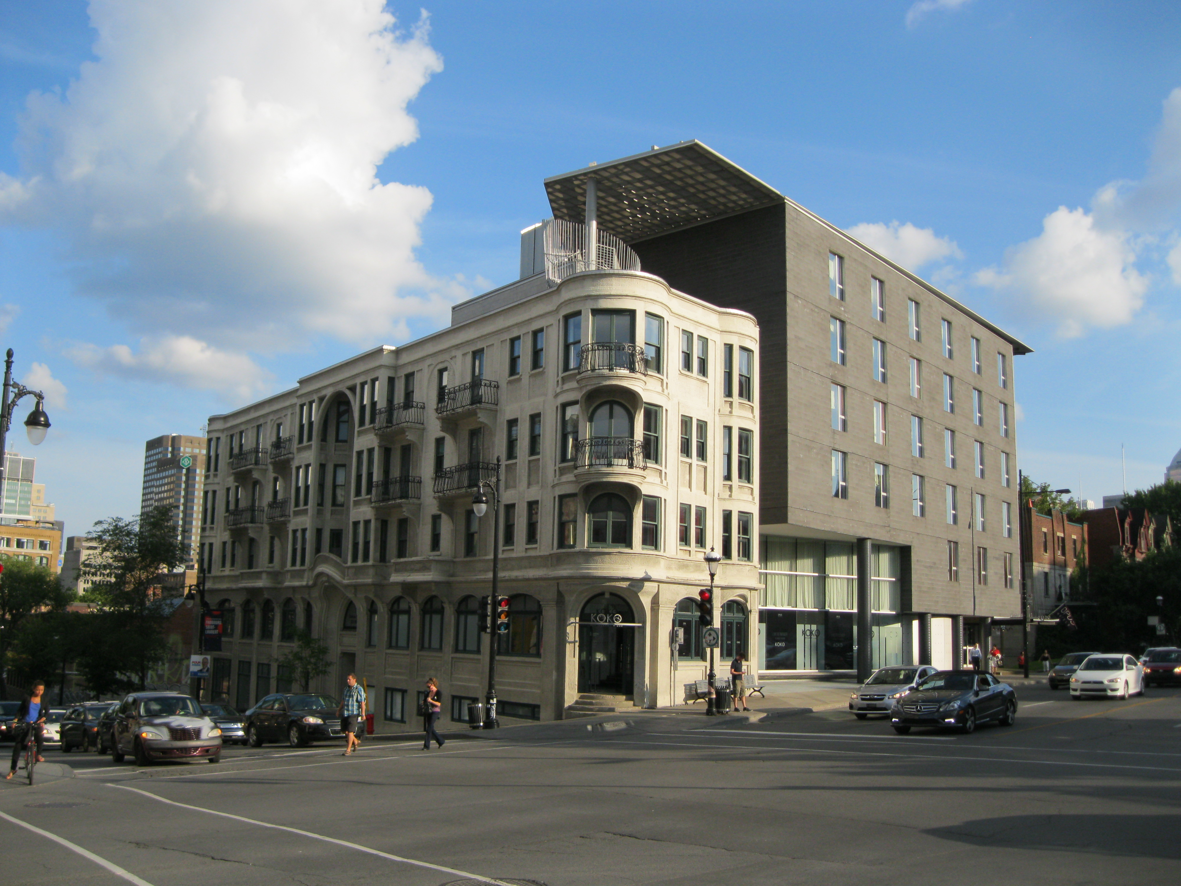 L'édifice Joseph-Arthur-Godin, classé monument historique, est un ancien immeuble de rapport construit en 1914. Il est situé au 2112, boulevard Saint-Laurent, Montréal